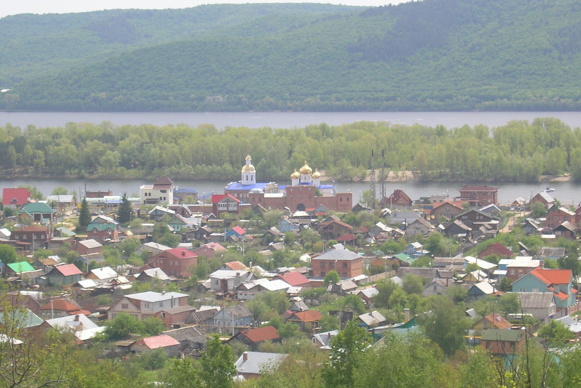 Благовещенский скит, Фёдоровка,Тольятти, Россия. Вид со станции Канал